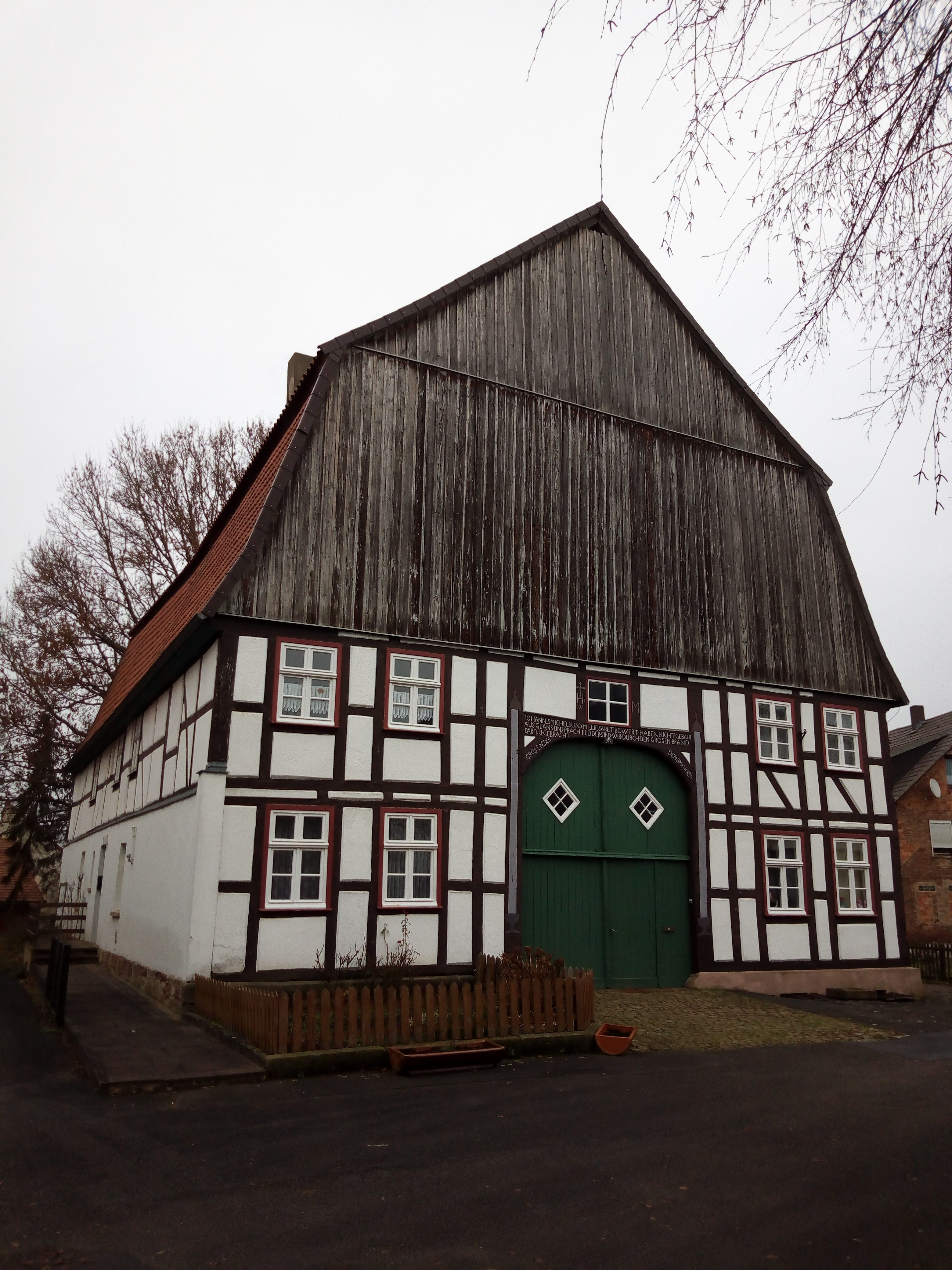 Michelshof (1829), Auf'm Thie, Großeneder, Borgentreich